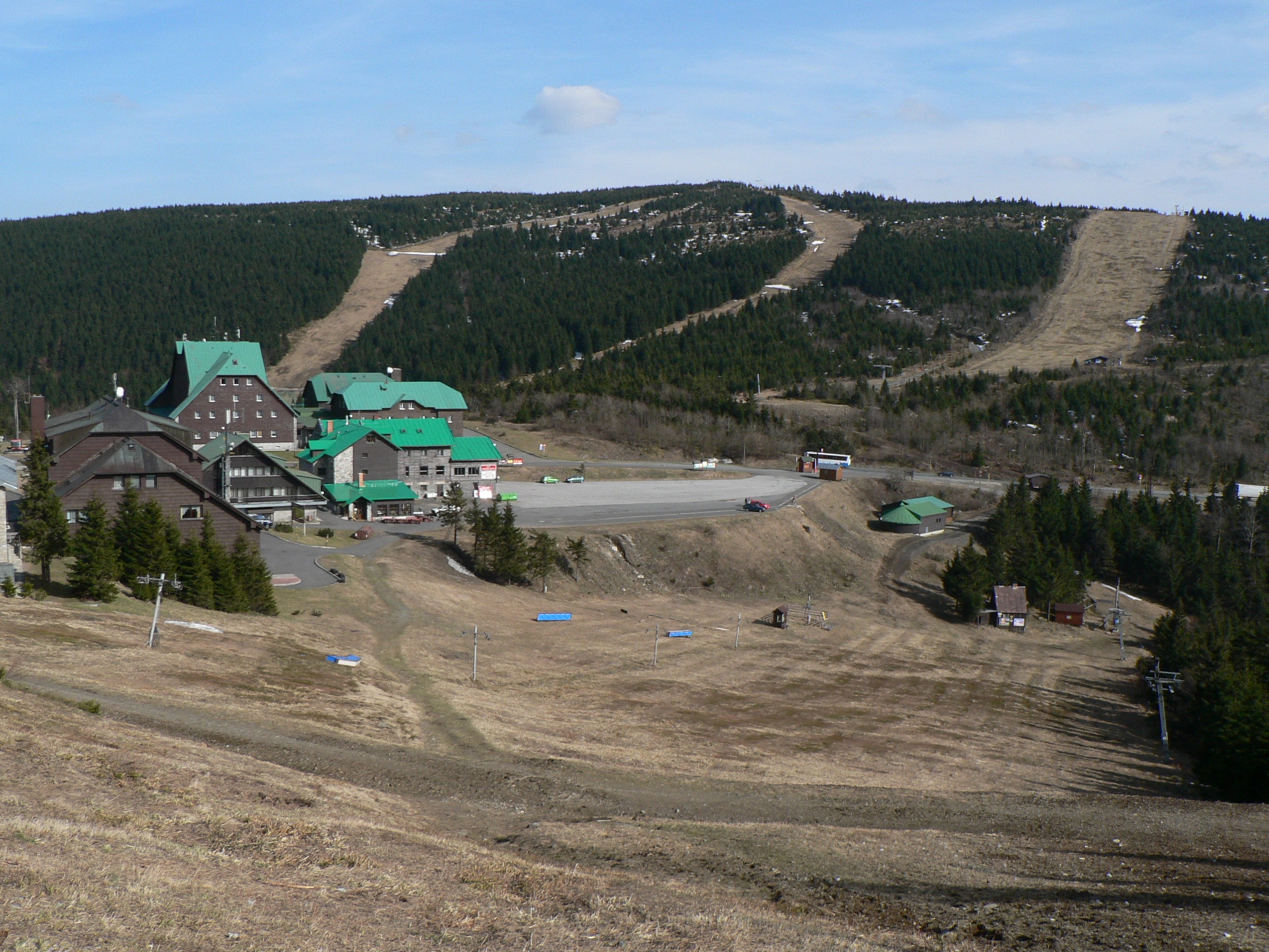 Velký Klínovec nad Červenohorským sedlem.